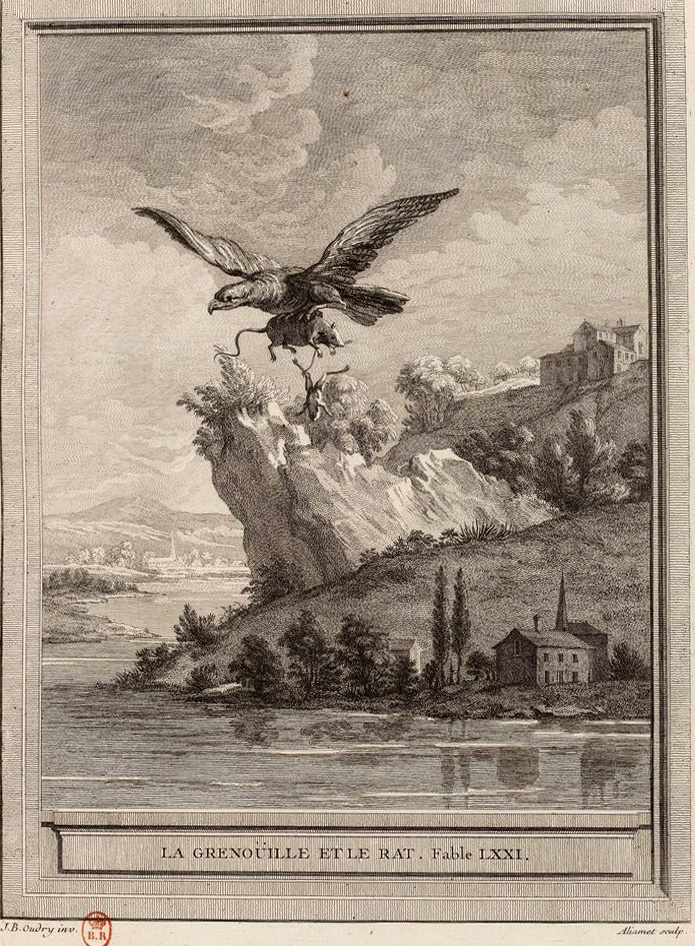 Gravure réalisée par Jacques Aliamet d'après un dessin de Jean-Baptiste Oudry représentant la fable La grenouille et le rat de Jean de La Fontaine (fable 11 du livre IV). Cette gravure est parue dans l'édition complète des fables de La Fontaine, parue en quatre tomes chez l'éditeur Desaint & Saillant, rue saint Jean de Beauvais à Paris, 1755-1759.